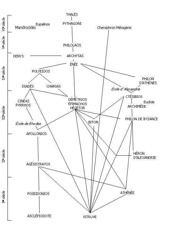 Principe de filiation et apparition d'une tradition dans la transmission des savoir-faire entre ingénieurs de l'Antiquité. Constitution d'un corpus technique accessible à tous à travers les traités